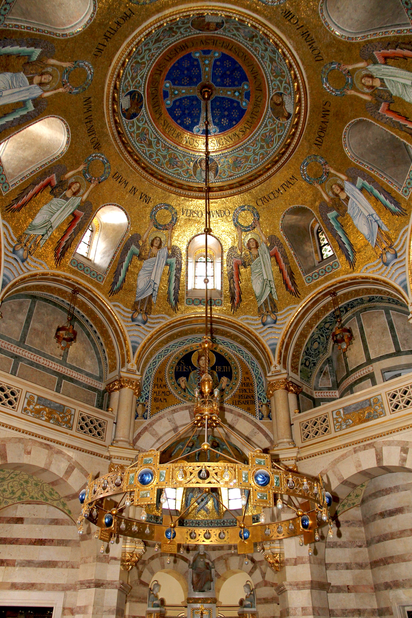 Goldmosaikgeschmückte Decke der Elisabethkapelle in der Mexikokirche im 2. Wiener Gemeindebezirk Leopoldstadt nach einem Entwurf von Carl Ederer. Die Jugendstilkapelle wurde in memoriam der Kaiserin Elisabeth vom Roten Kreuz finanziert, 1907 fertiggestellt und am 10. Juni 1908 feierlich geweiht.